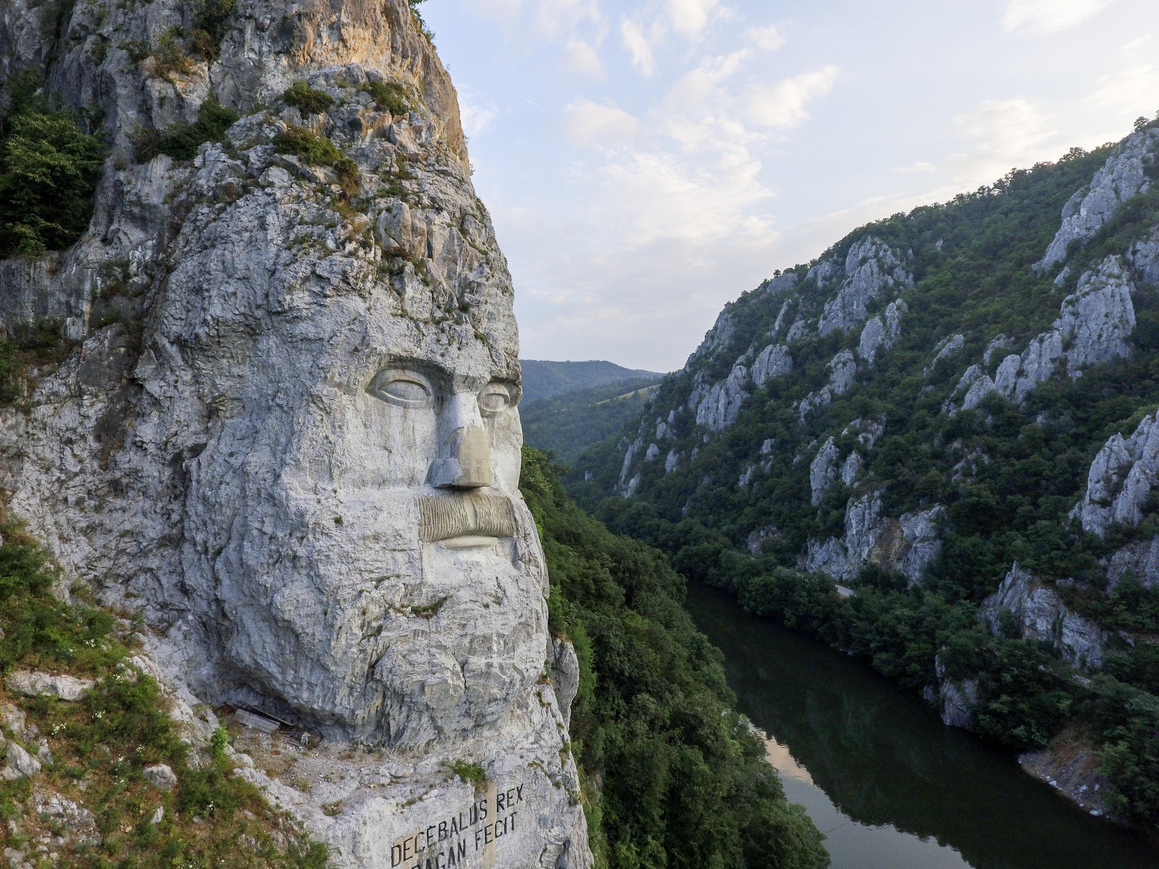 Statuia „Chipul lui Decebal" aflată în județul Mehedinți. Fotografie realizată de către George Bufan Pentru